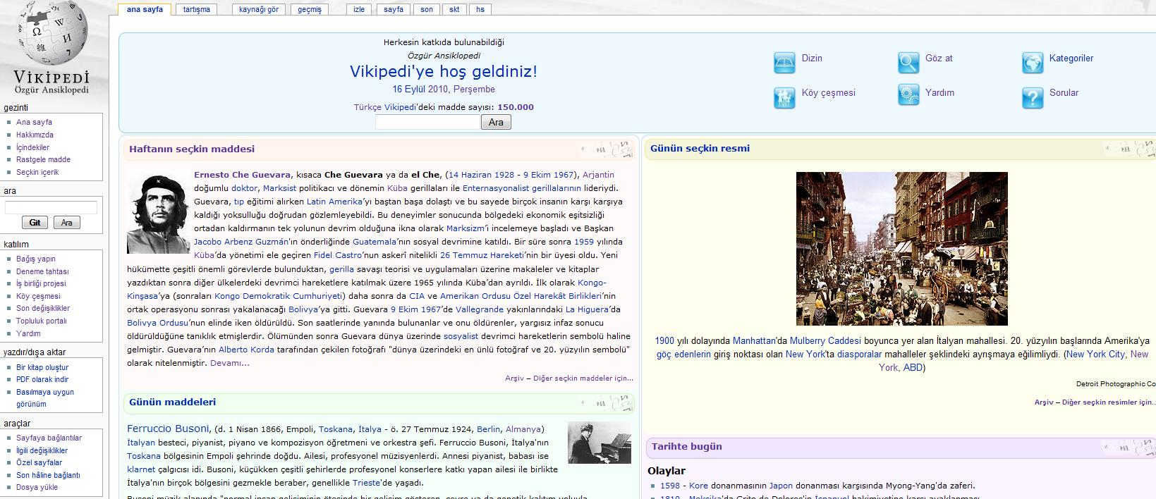 Türkçe Vikipedi 150,000. maddede!